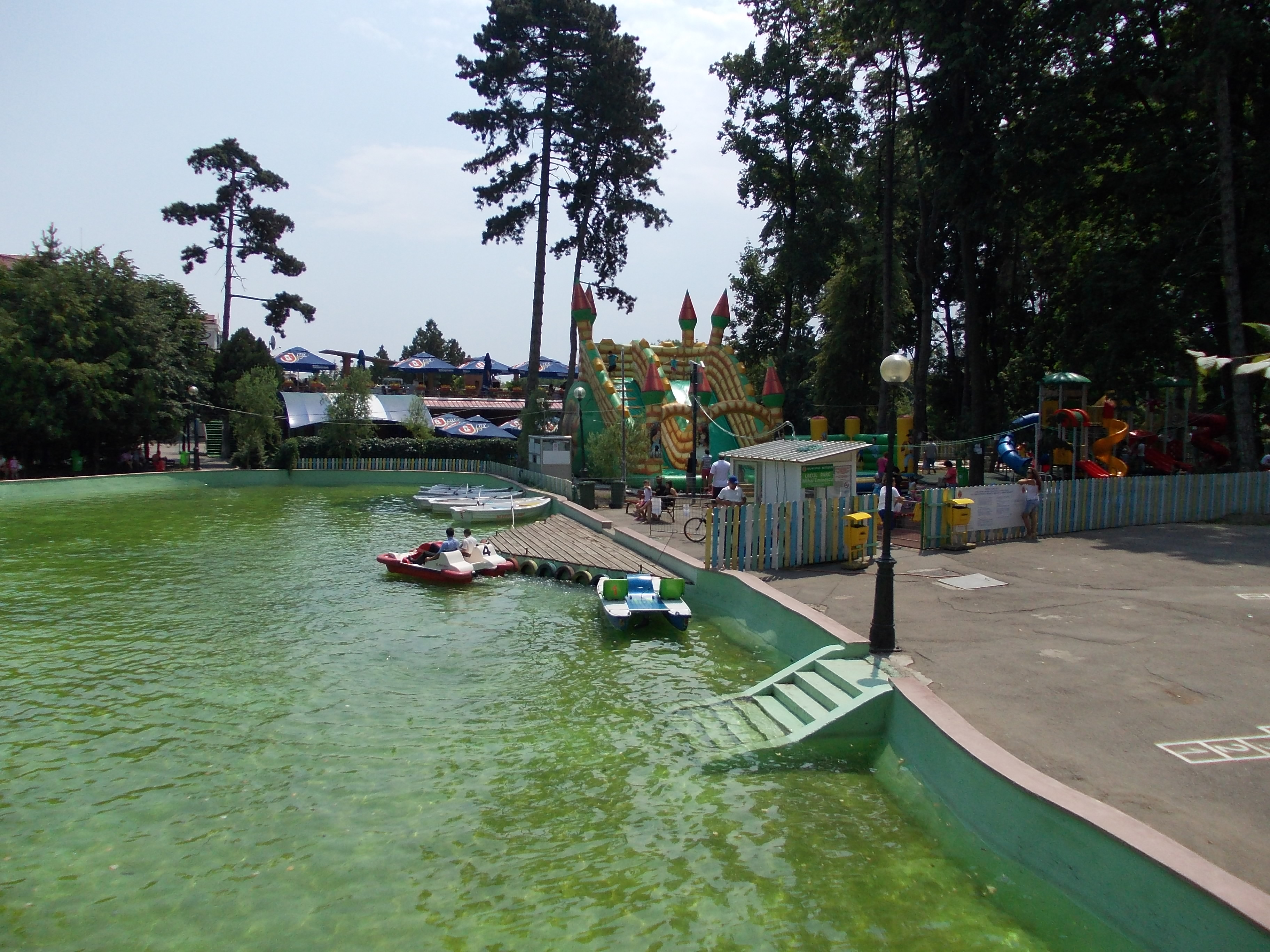 Parcul din Botoşani